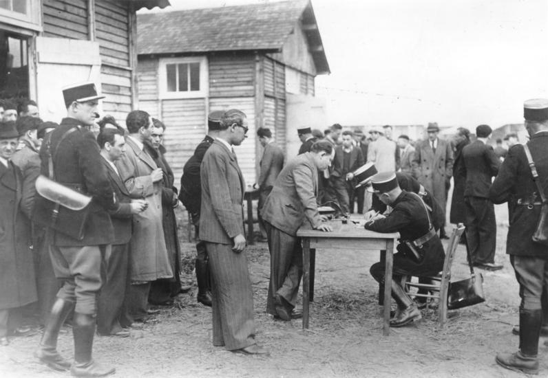 Frankreich, Internierungslager Pithiviers 1941: Das Juden -Internierungslager von Pithiviers im Departement Loiret (Frankreich): Nach der Ankunft im Lager eingehende Kontrolle der Neuangekommenen durch die französische Polizei. 10 000-41